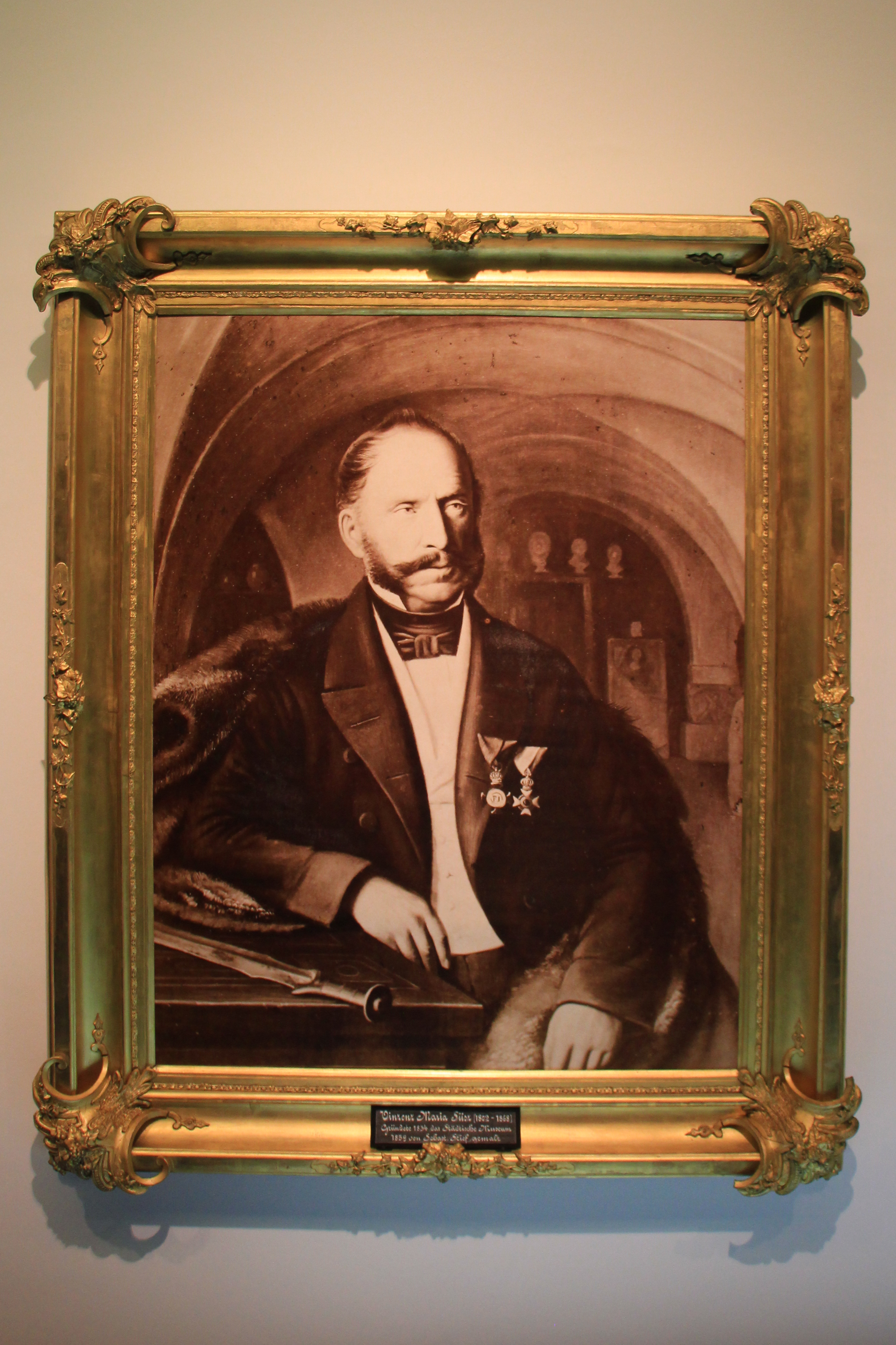 Gemälde vom Gründer Maria Vinzenz Suess im Salzburg Museum